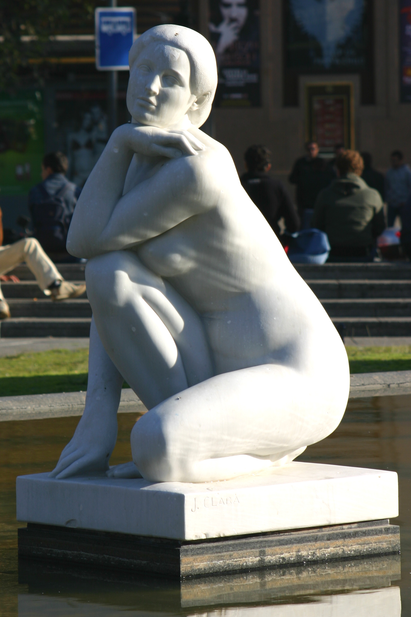 La Deessa o l'Enigma. Plaza Catalunya. Barcelona (Spain)